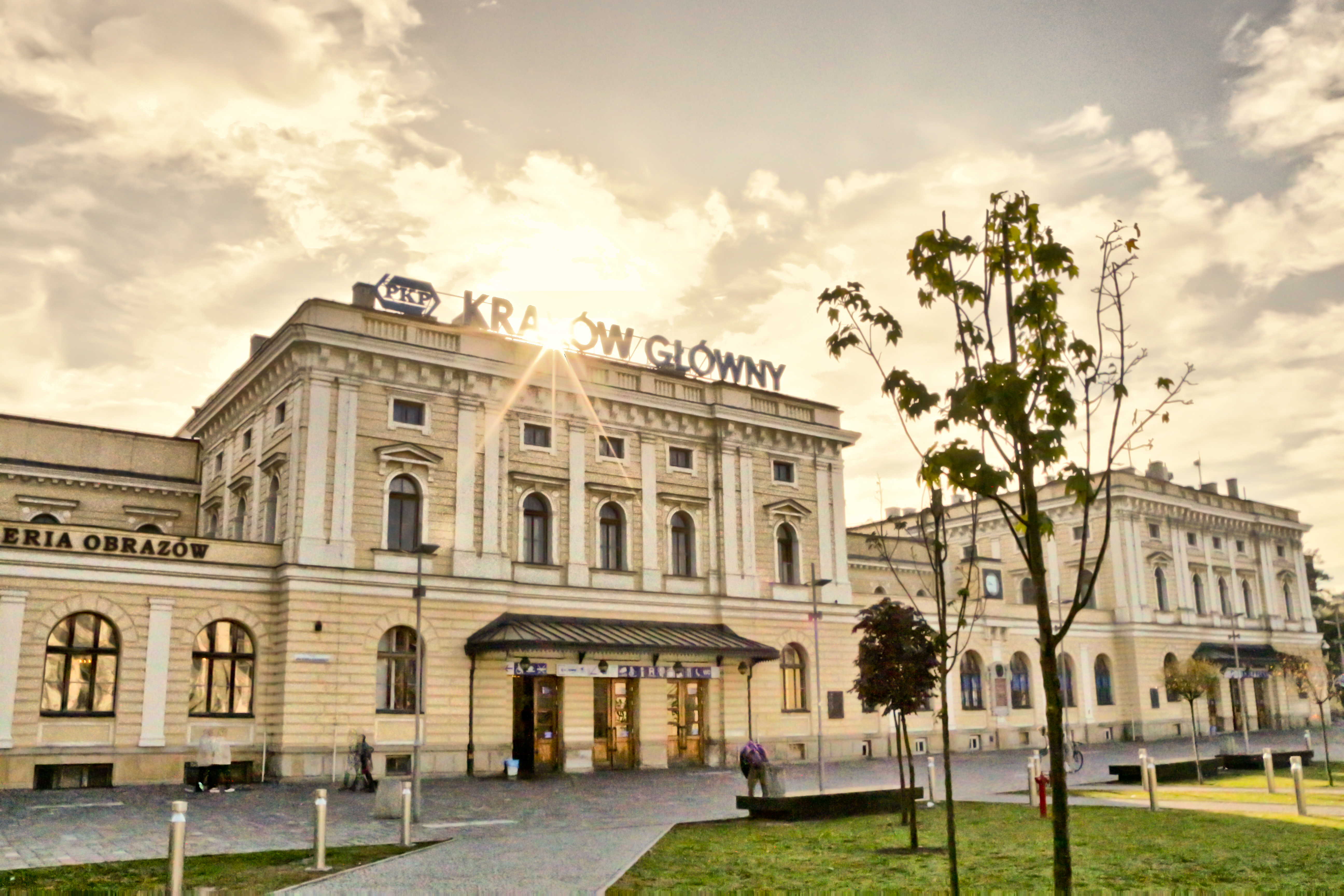 Dworzec Główny PKP - Kraków